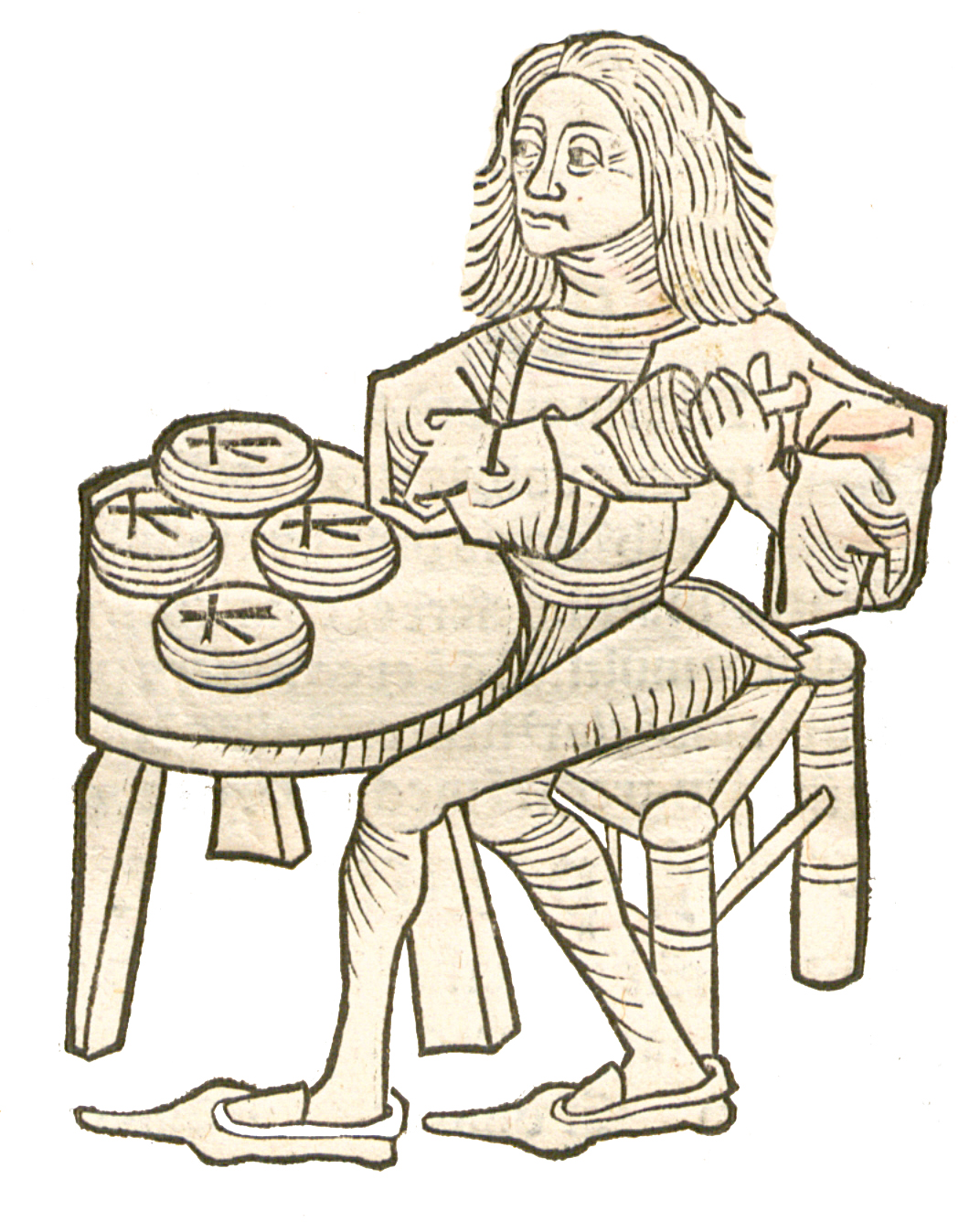 Abbildung zum Kapitel Terra sigillata. - Quelleː Hortus Sanitatis (1491), Buch V, Kapitel 130.